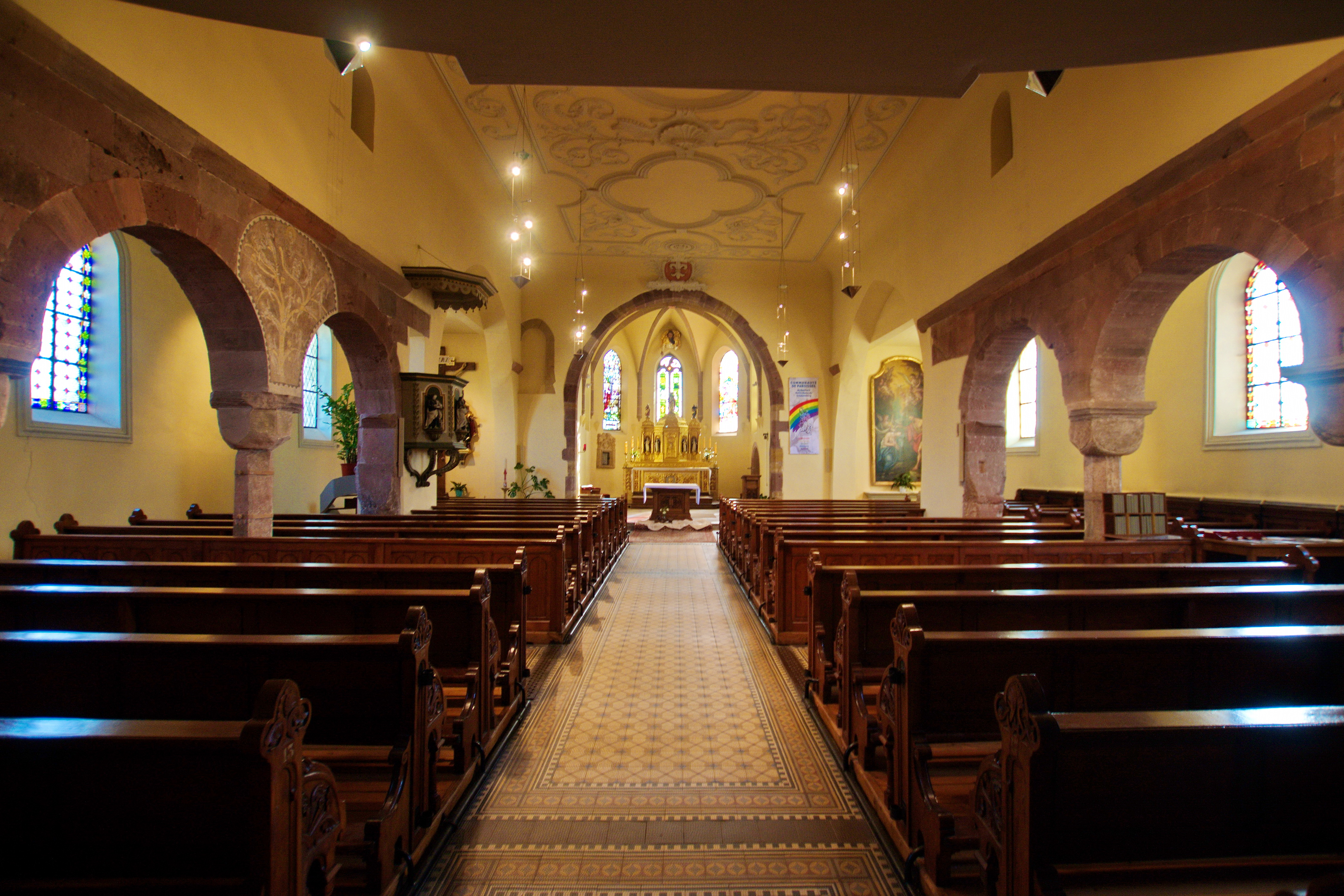 Église Sainte-Colombe de Hattstatt, 11 rue du Bourgrain (Inscrit, 1984) .